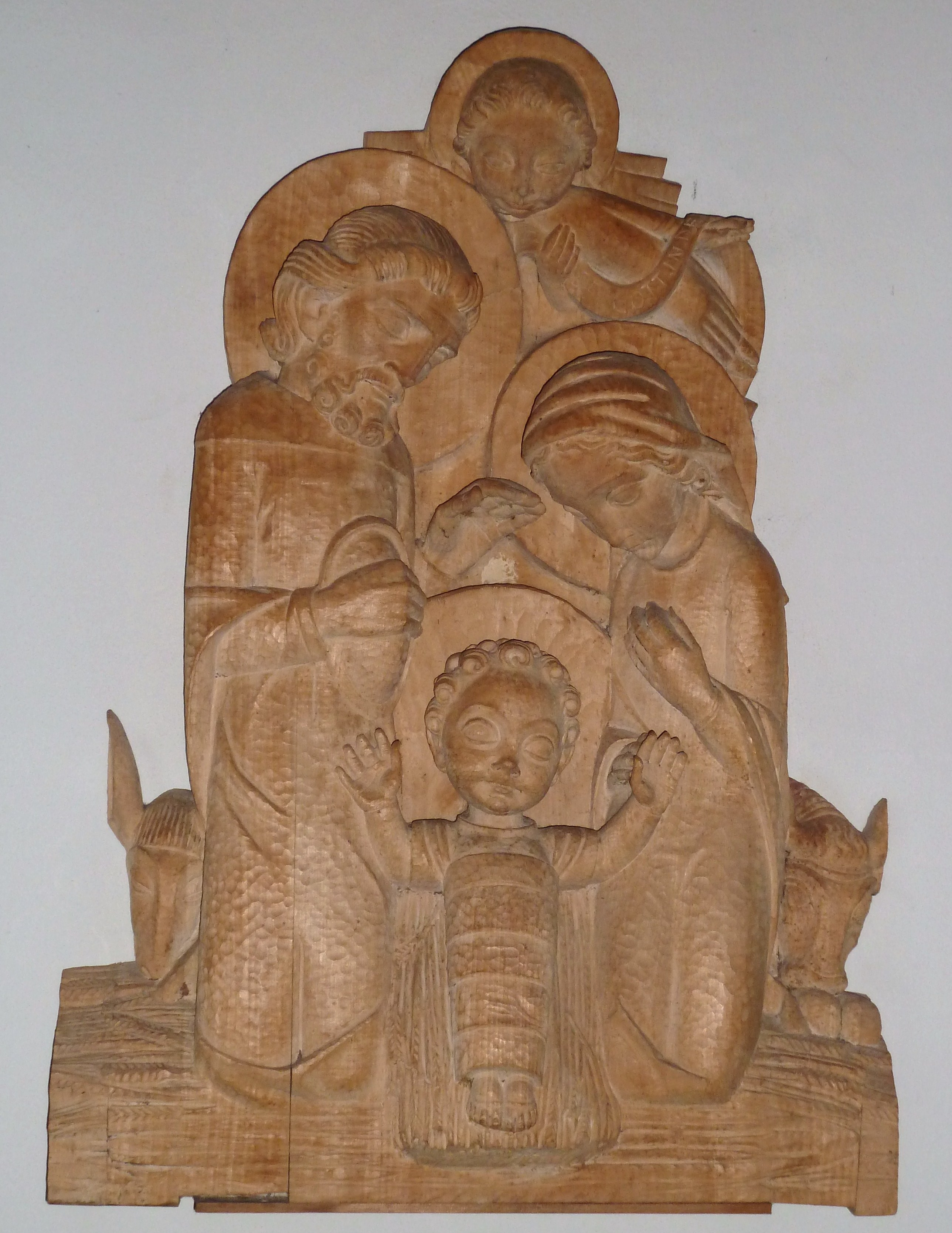 eigene Datei